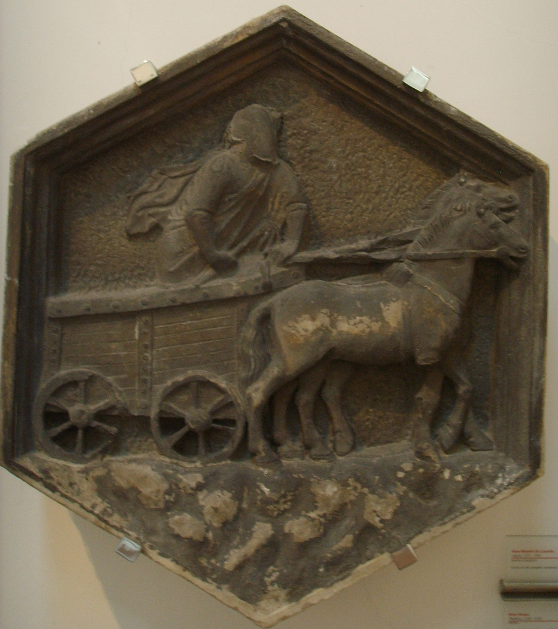 Formella 15, il carro di Tespi (Theatrica), nino pisano, 1334-1336